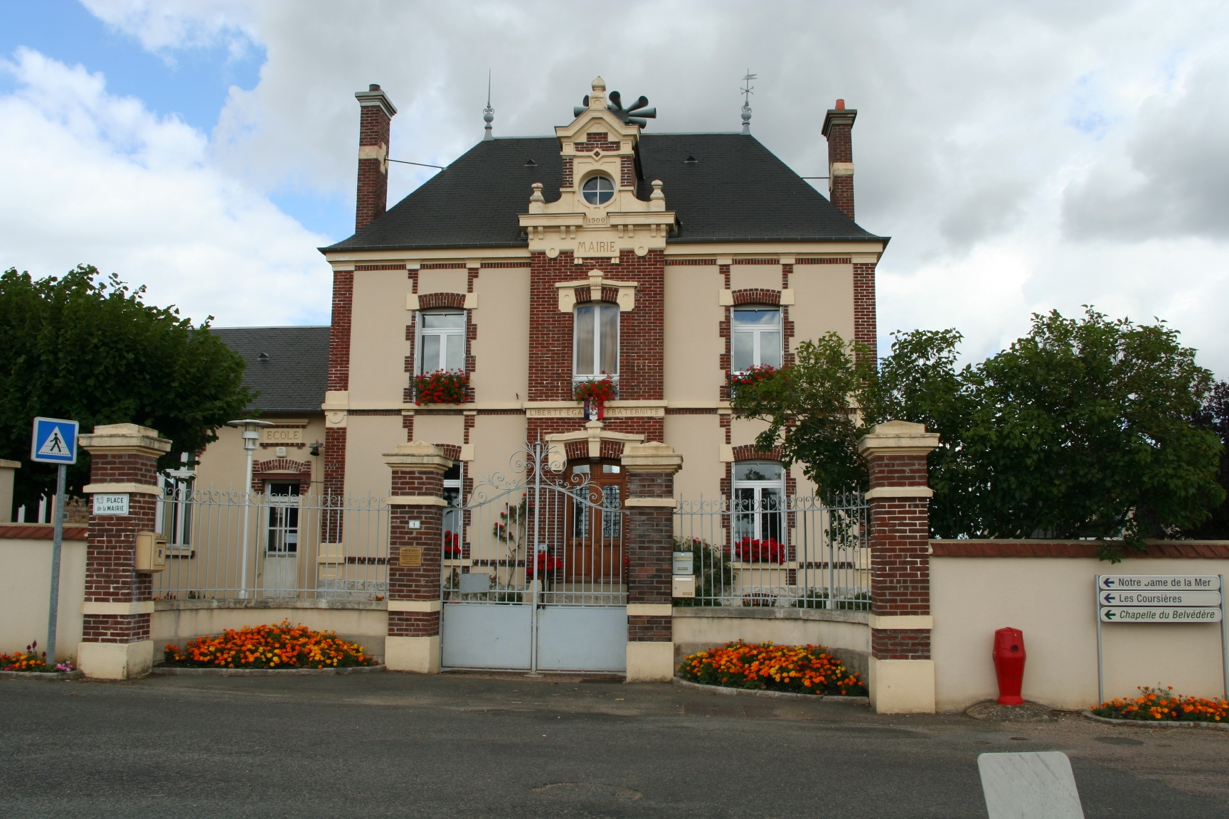 Mairie de jeufosse, Yvelines (France)